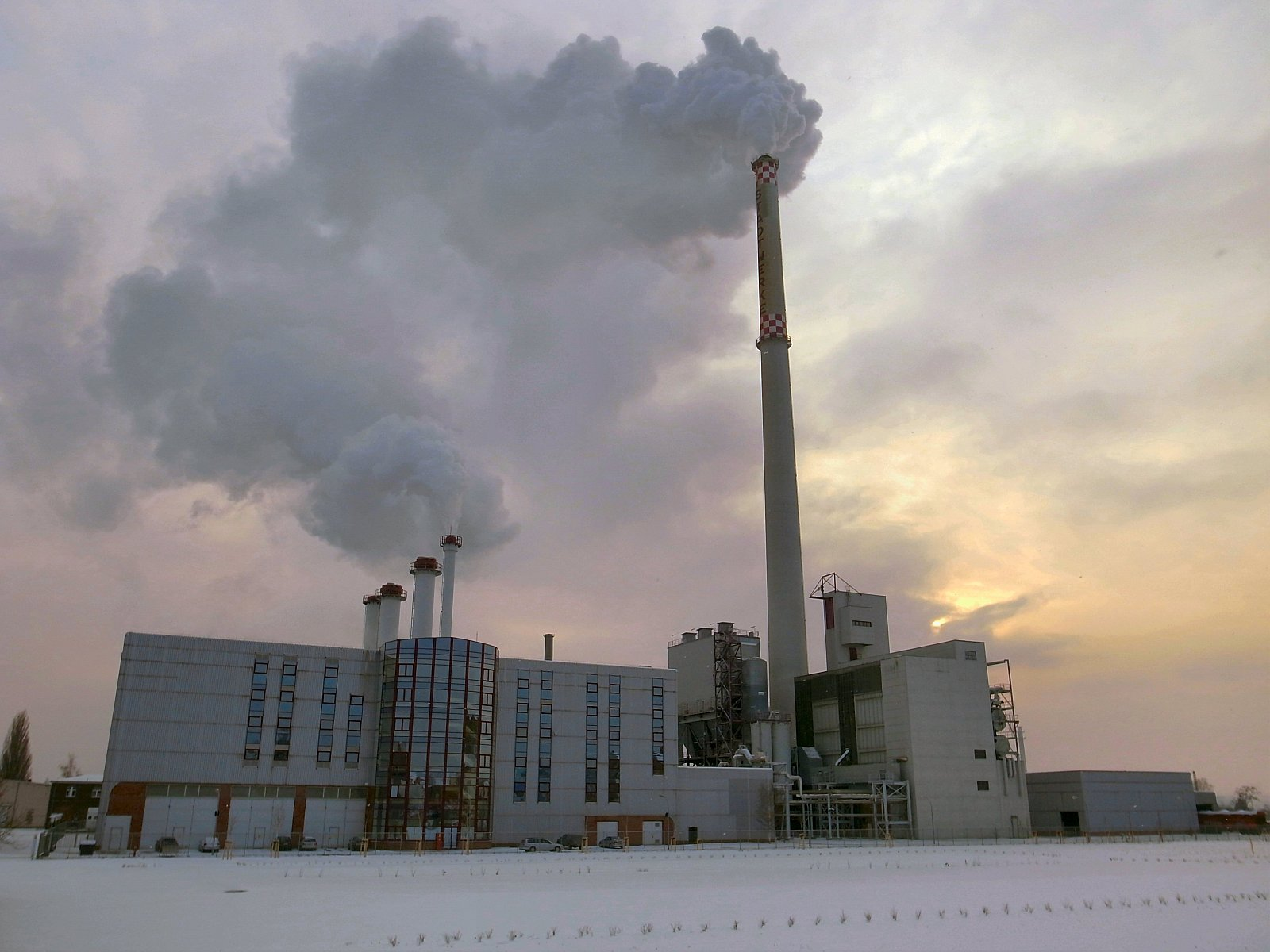 Stadwerke Dessau, Heizkraftwerk an der Fine